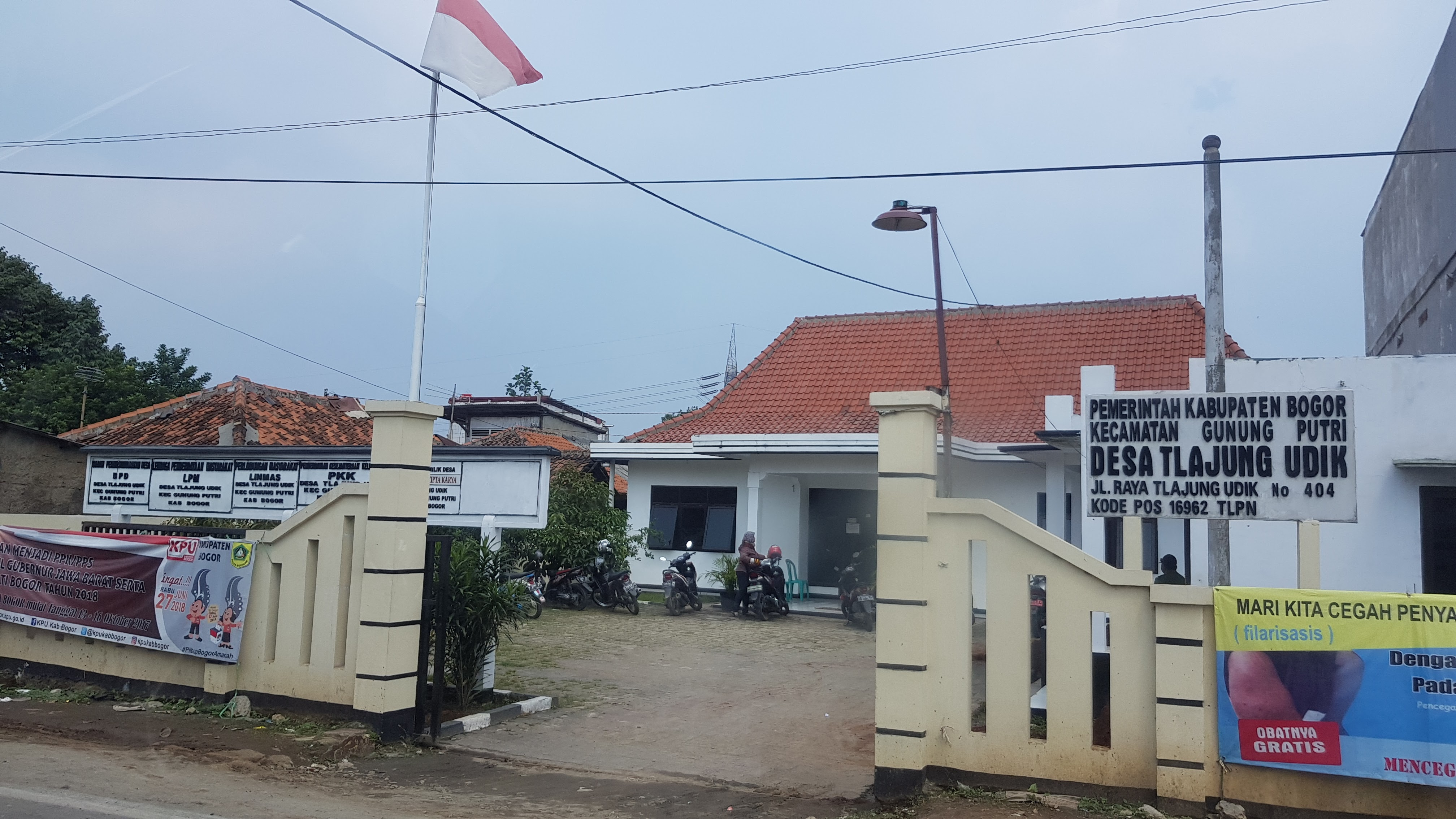 Kantor Desa Tlajung Udik, Gunung Putri, Kabupaten Bogor